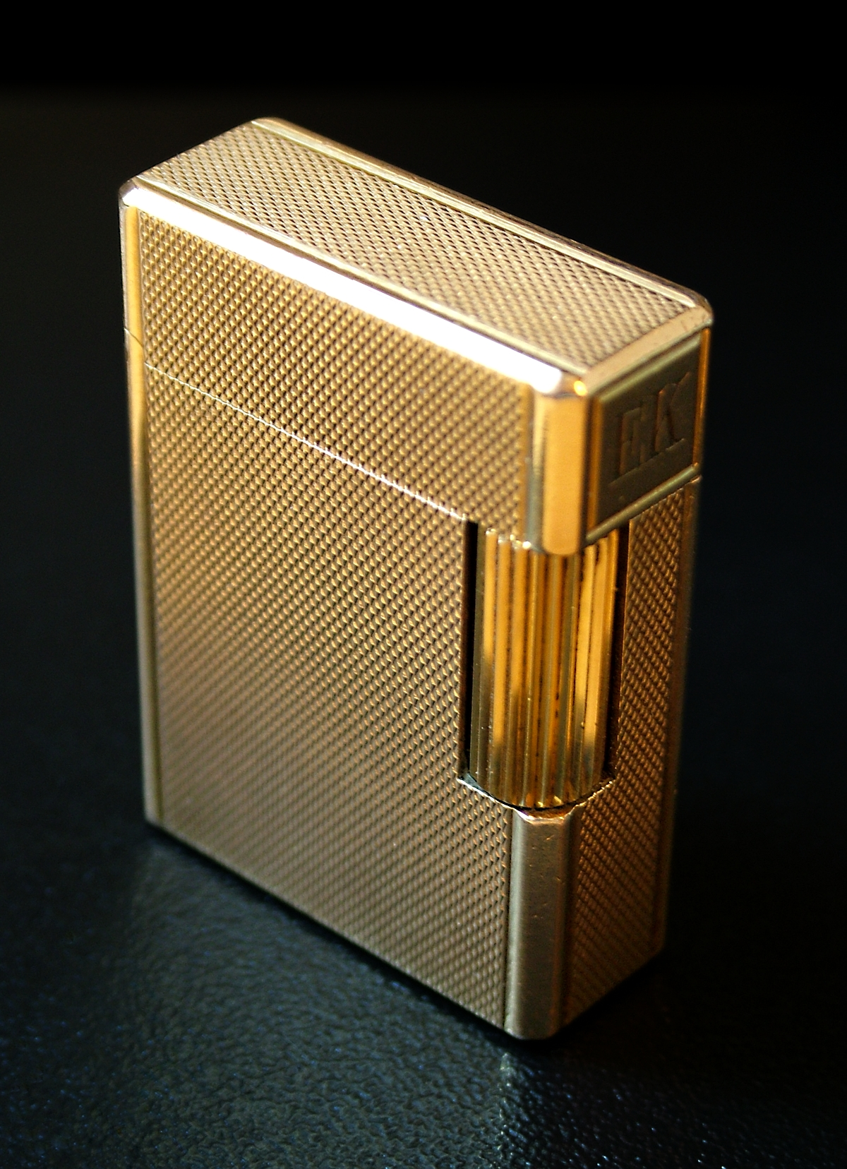 Feuerzeug der Marke S.T. Dupont, vergoldet, Louvre De Paris France By Ch. S